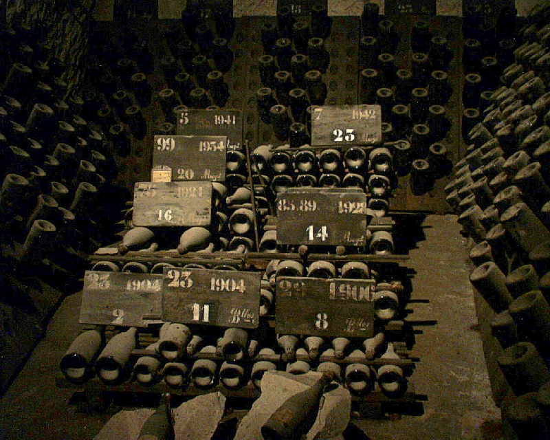 Bilder aus Reims